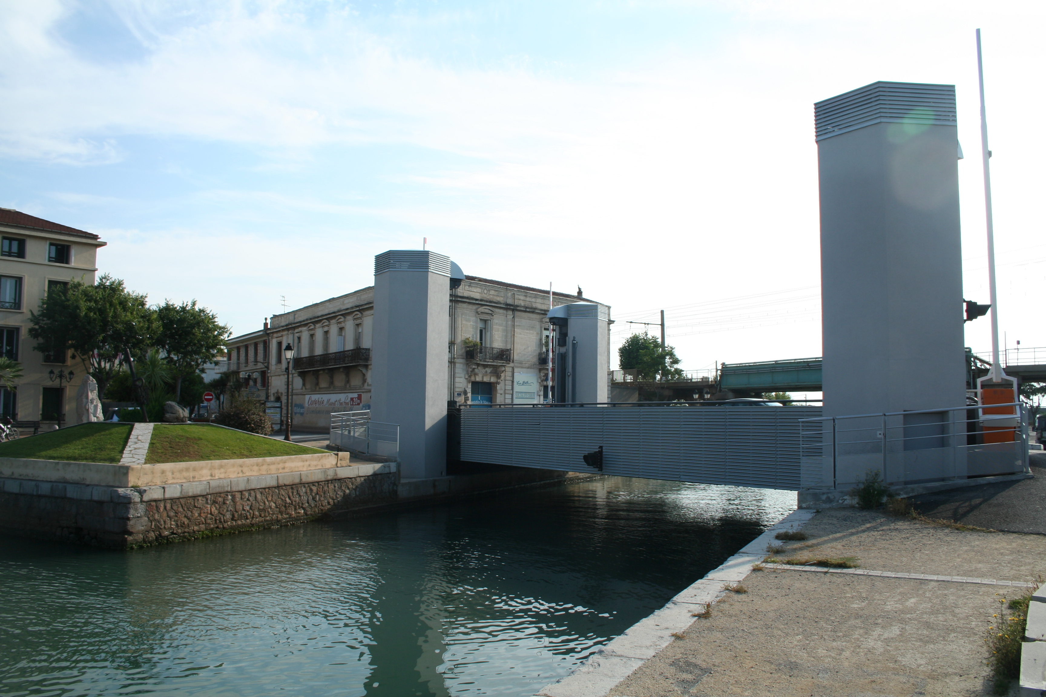 Frontignan (Hérault) - pont mobile sur le canal du Rhône à Sète.